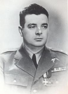 Roman Rudkowski – cichociemny